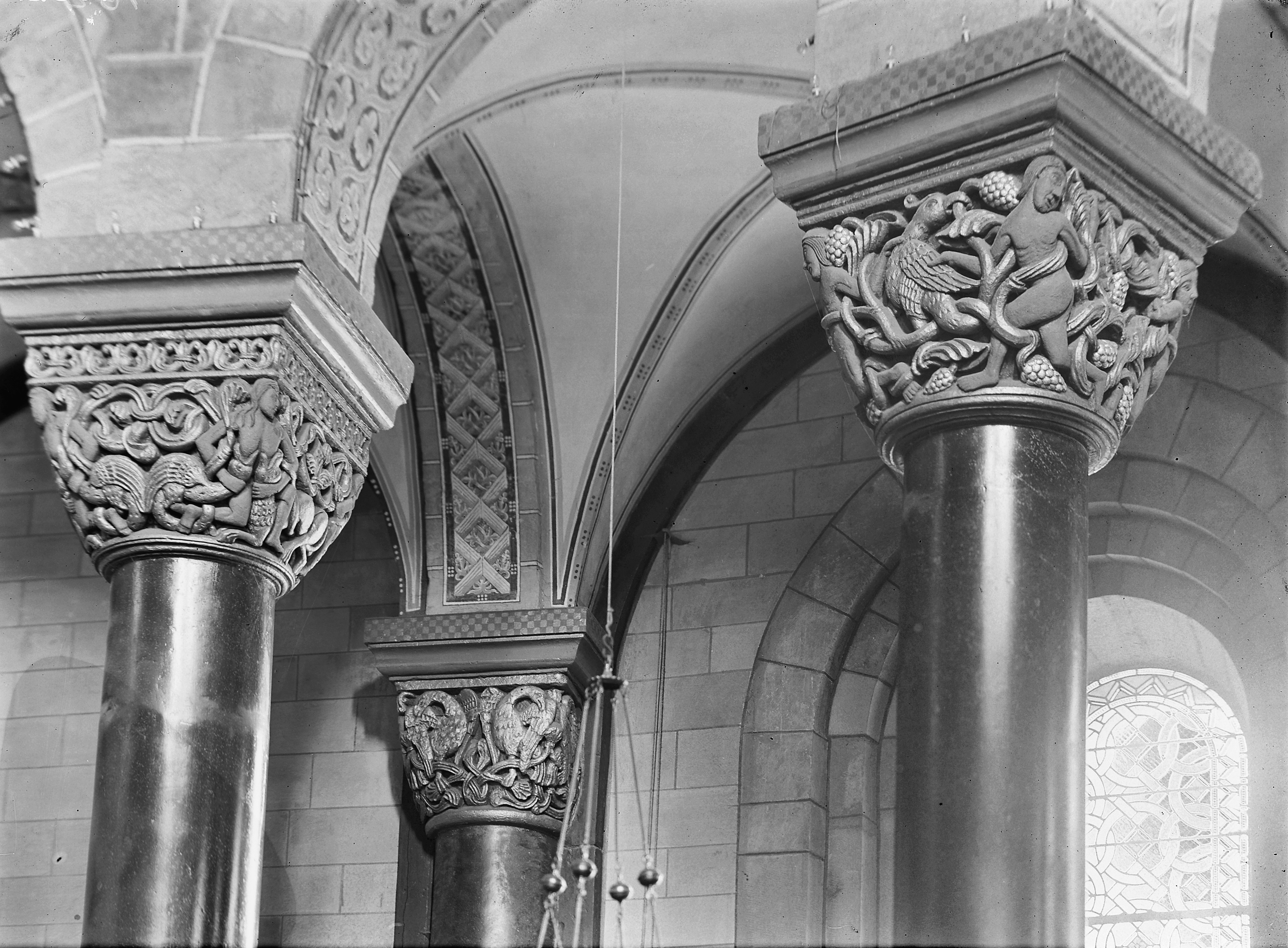 Onze Lieve Vrouwekerk: Interieur, eerste en tweede kapiteel koor, vrijstaande kolommen, noordzijde